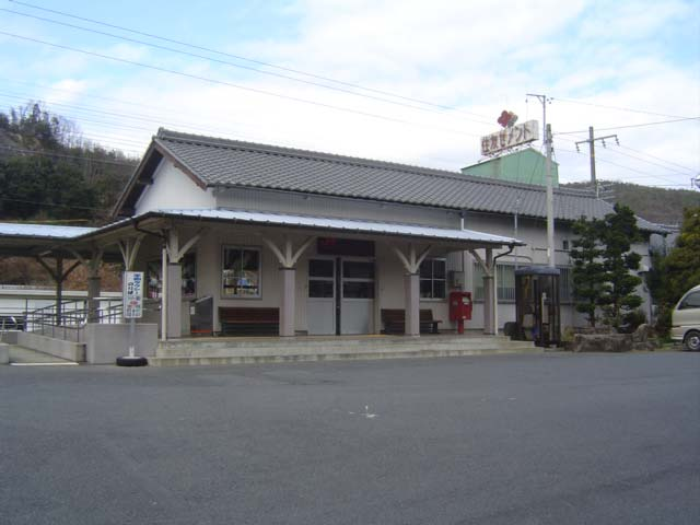 釜戸駅駅舎 投稿者が撮影（2004年12月22日）